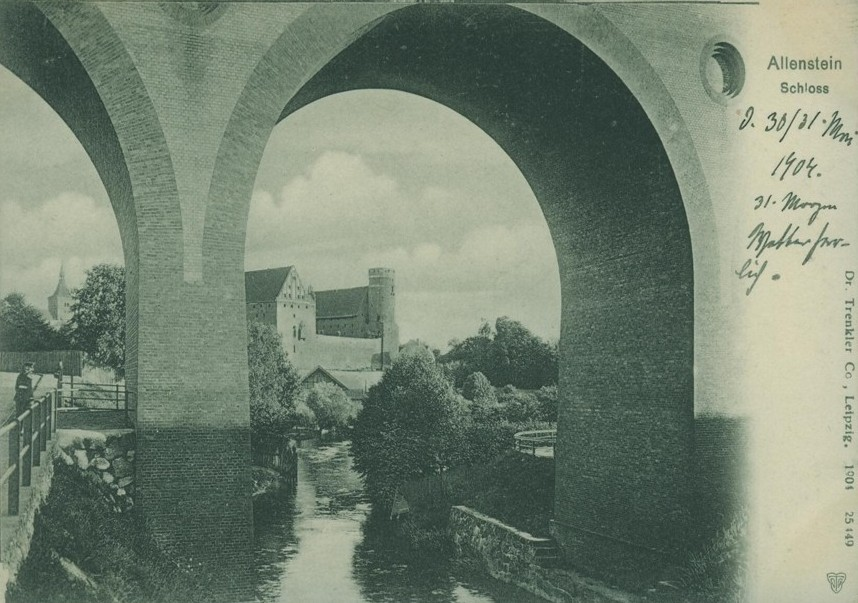 Olsztyn - Zamek Kapituły Warmińskiej Burg Allenstein in Deutscher Zeit